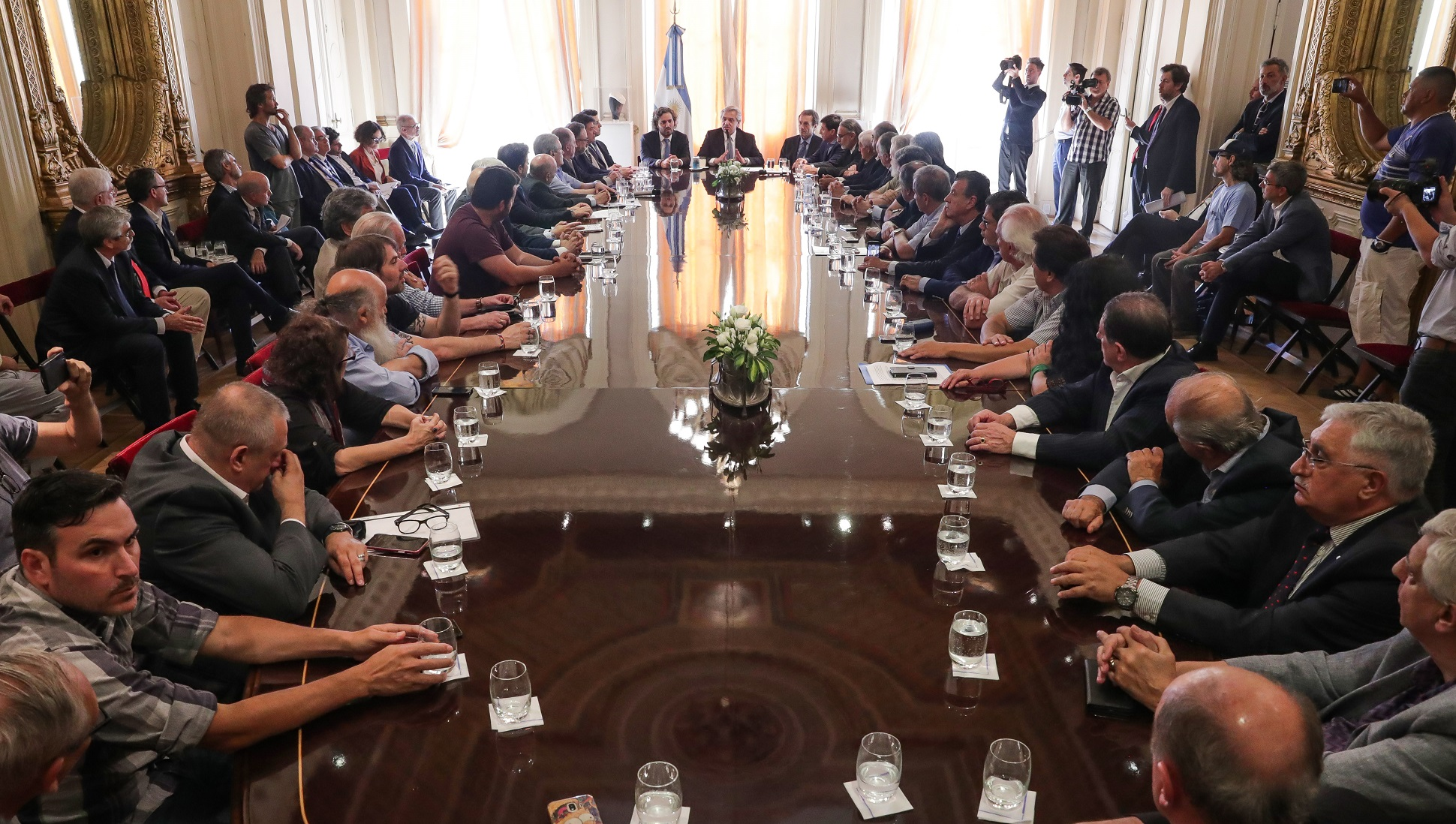 El presidente de la Nación, Alberto Fernández, firmó junto a empresarios, representantes gremiales y de movimientos sociales, el denominado “Compromiso Argentino por el desarrollo y la solidaridad”, en el cual se insta llevar adelante "consensos de largo plazo, que vayan más allá de un período presidencial y que incluyan metas compartidas y posibles de alcanzar en distintas etapas." Junto al primer mandatario, estuvieron presentes el Jefe de Gabinete Santiago Cafiero, los ministros del Interior, Eduardo de Pedro, el de Trabajo, Empleo y Seguridad Social, Claudio Moroni, de Desarrollo Social, Daniel Arroyo, y de Agricultura, Ganadería y Pesca, Luis Basterra.